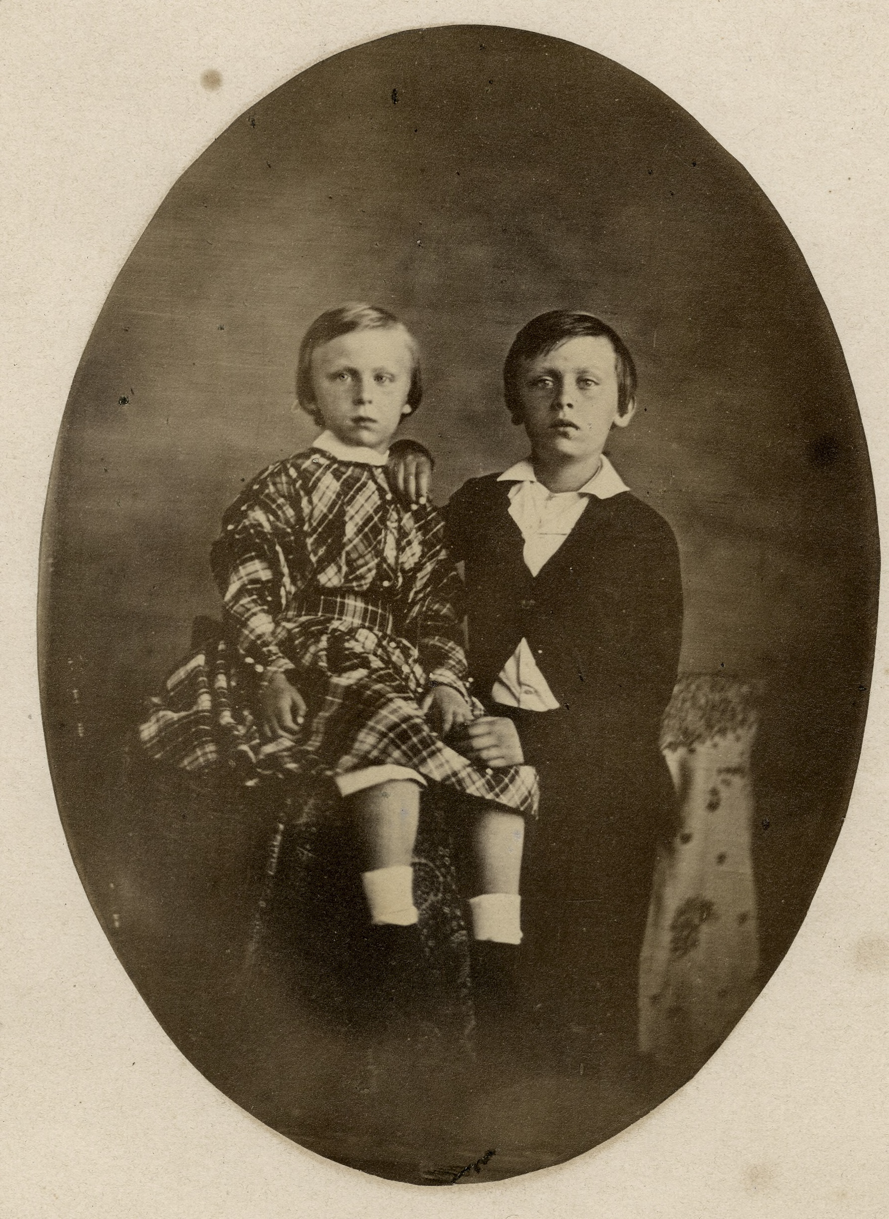 De prinsjes Maurits en Willem - foto uit 1847, te oud voor copyright